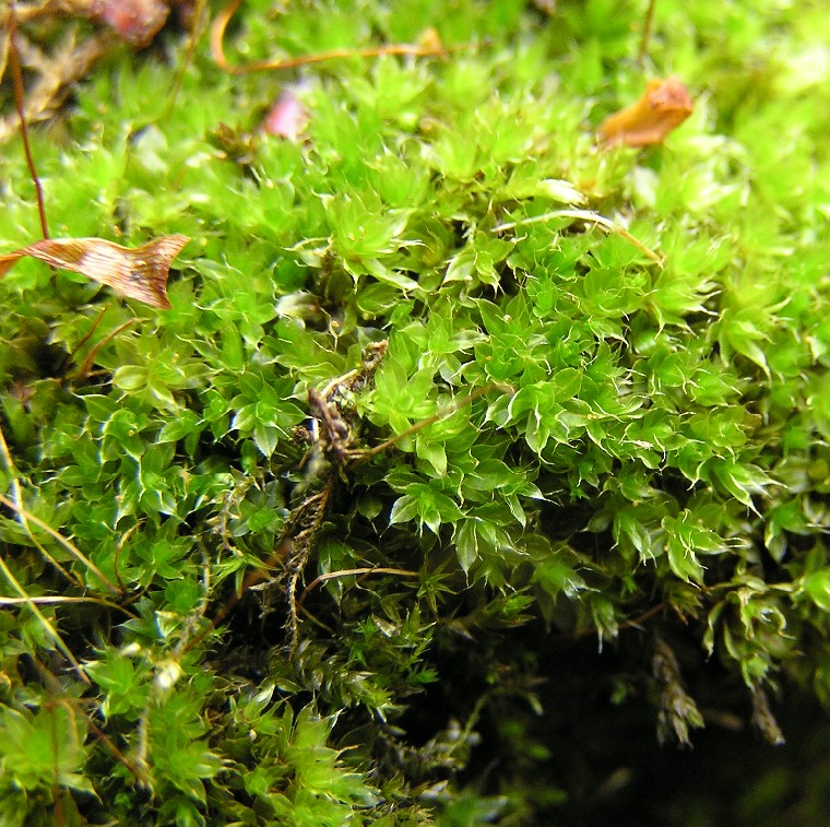 Bryum capillare auf einer Mauer im Alten Friedhof Bonn